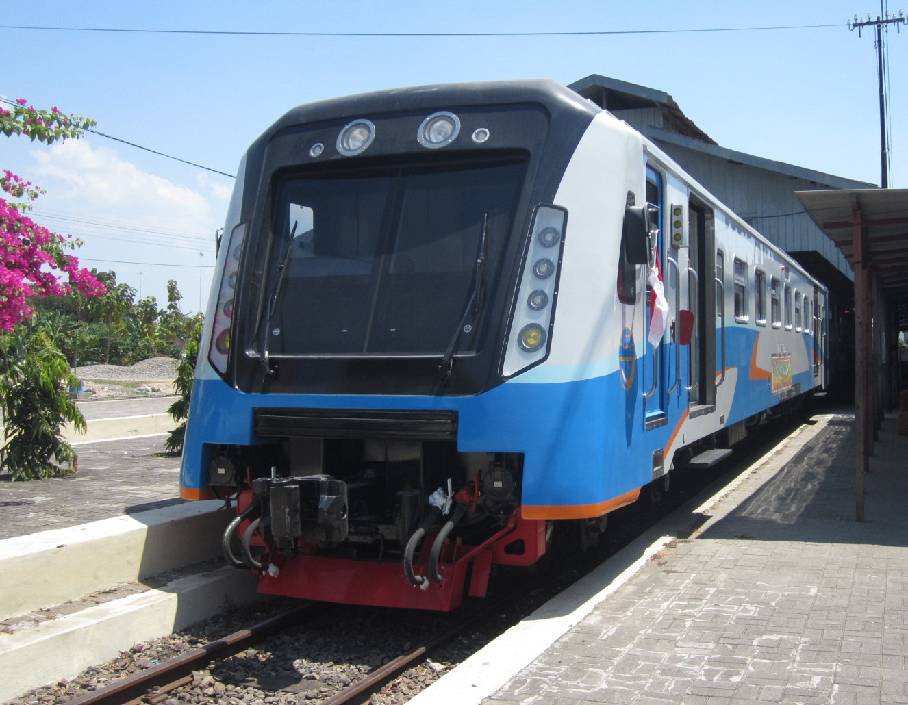 Kereta api Cepu Ekspres di Stasiun Bojonegoro.